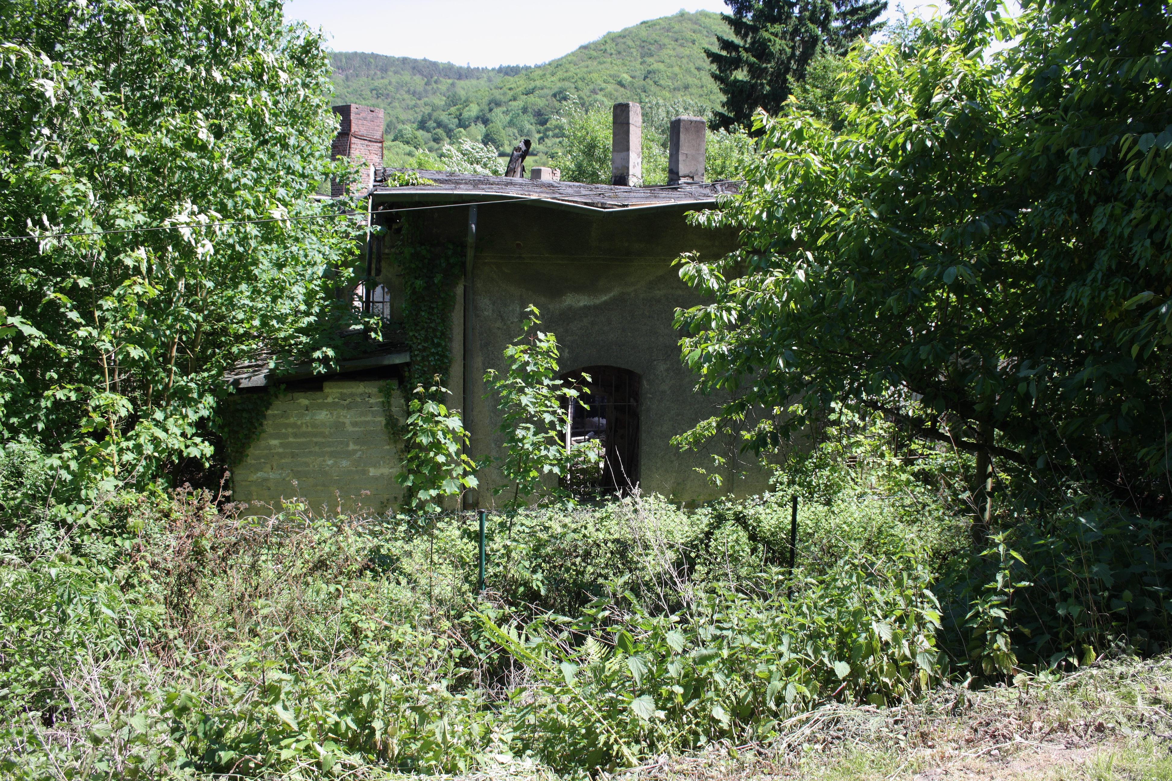 Bahnbetriebswerk in Kreuzberg, einem Ortsteil von Altenahr im Landkreis Ahrweiler (Rheinland-Pfalz)